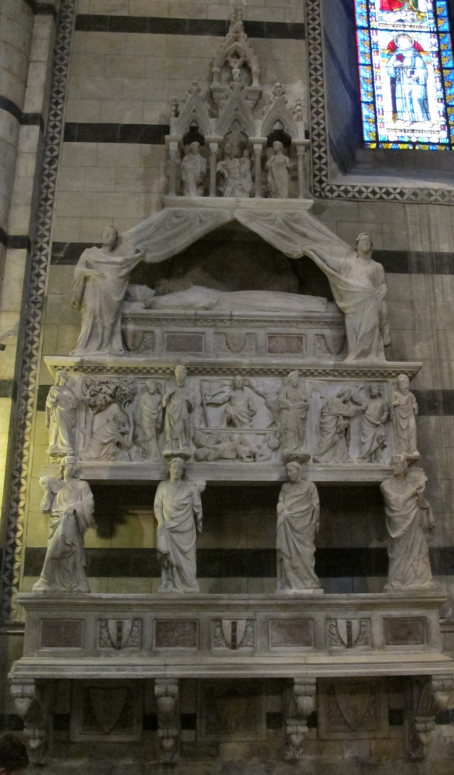 Tino di camaino, monumento al cardinale Riccardo Petroni, 1314 circa